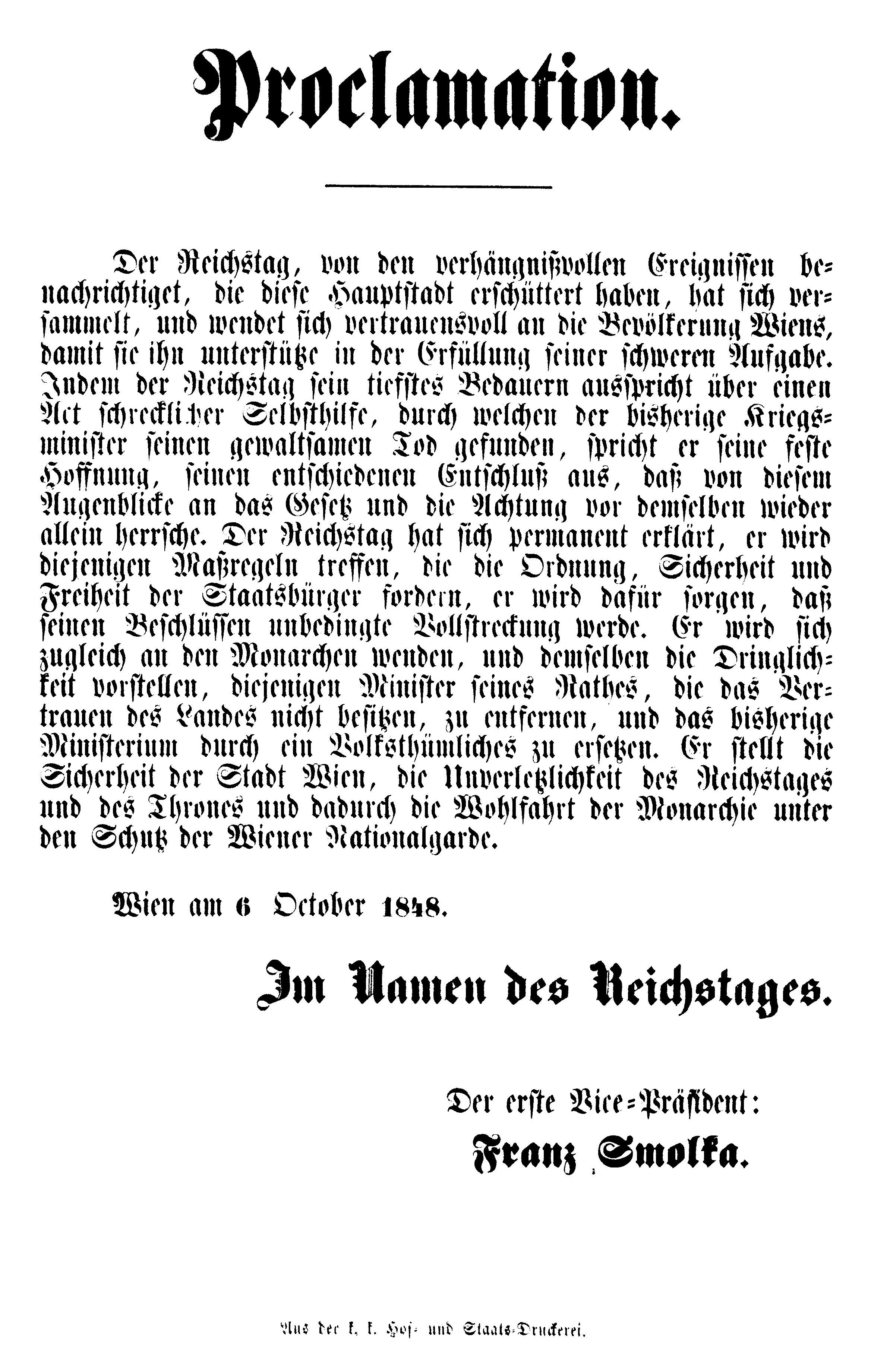 Reichtags-Proclamation, gefertigt von Franz Smolka (1810–1899), Wien, 6. Oktober 1848